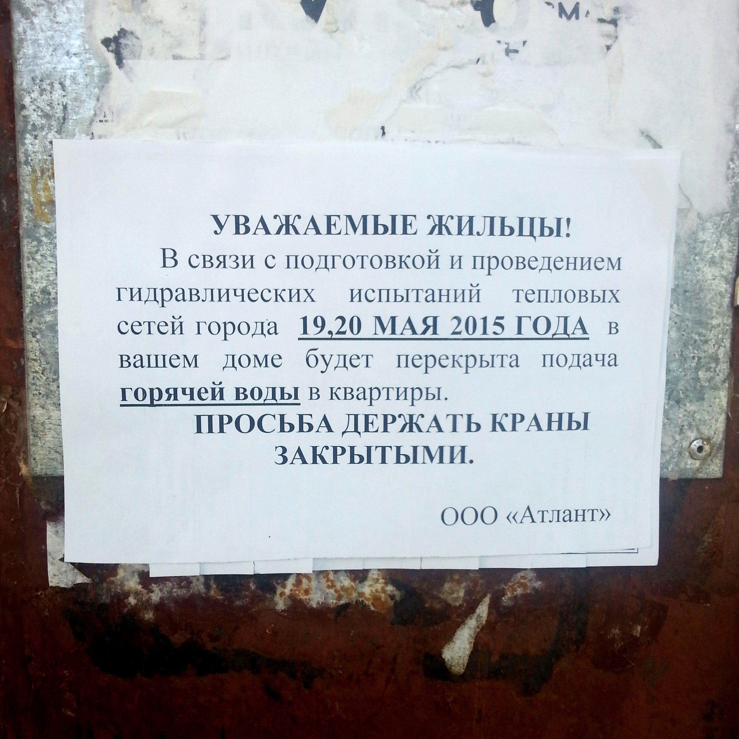 Объявление о проведении гидравлических испытаний